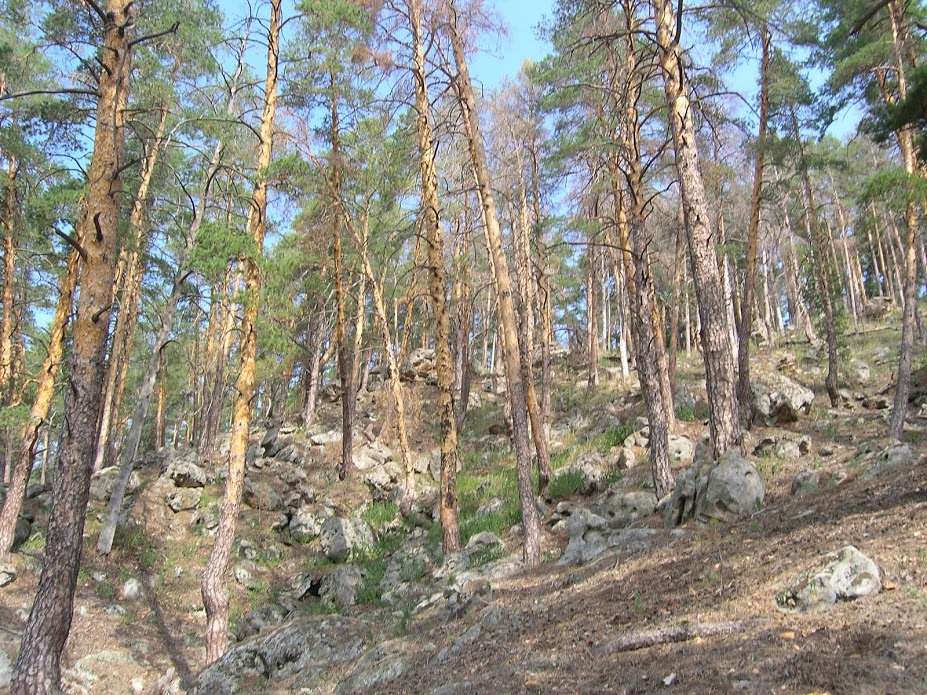 Памятник природы "Малоусинские нагорные сосняки и дубравы". Склон Гремячинских высот